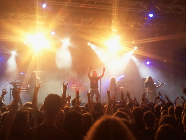 Moonspell live al Festival 2012 al Live Club di Trezzo sull'Adda.